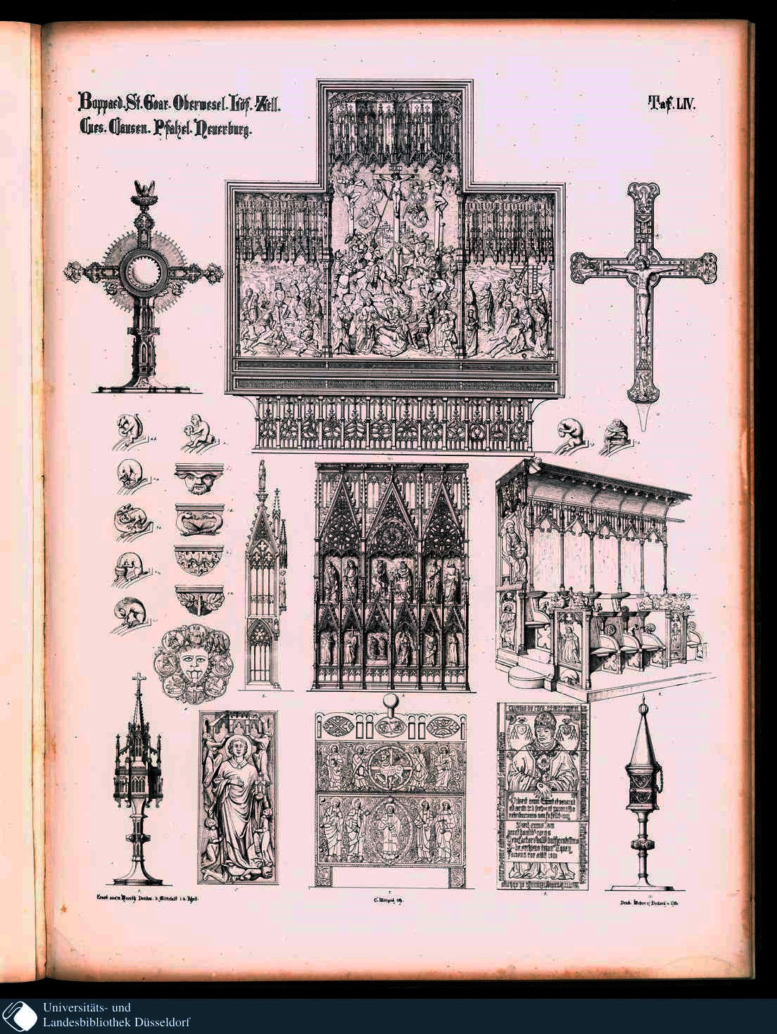 Abbildung einer mittelalterlichen Monstranz aus Löf (Mosel) (auf der Seite links oben)